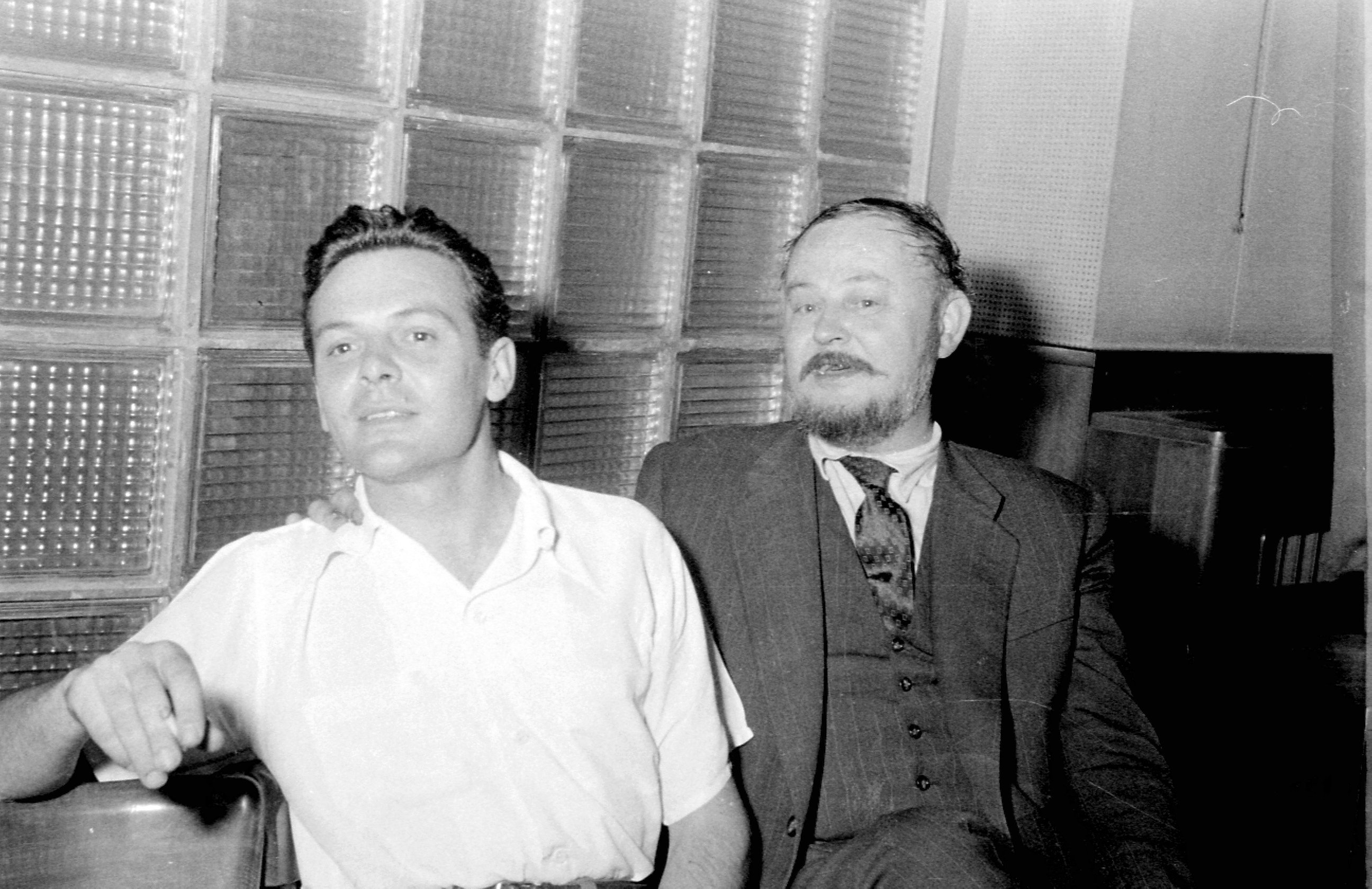 Раде Марковић, глумац и Бојан Ступица у Радио Београду, педесетих година 20. века. фото: Стеван Крагујевић (по одобрењу кћерке Тање Крагујевић)